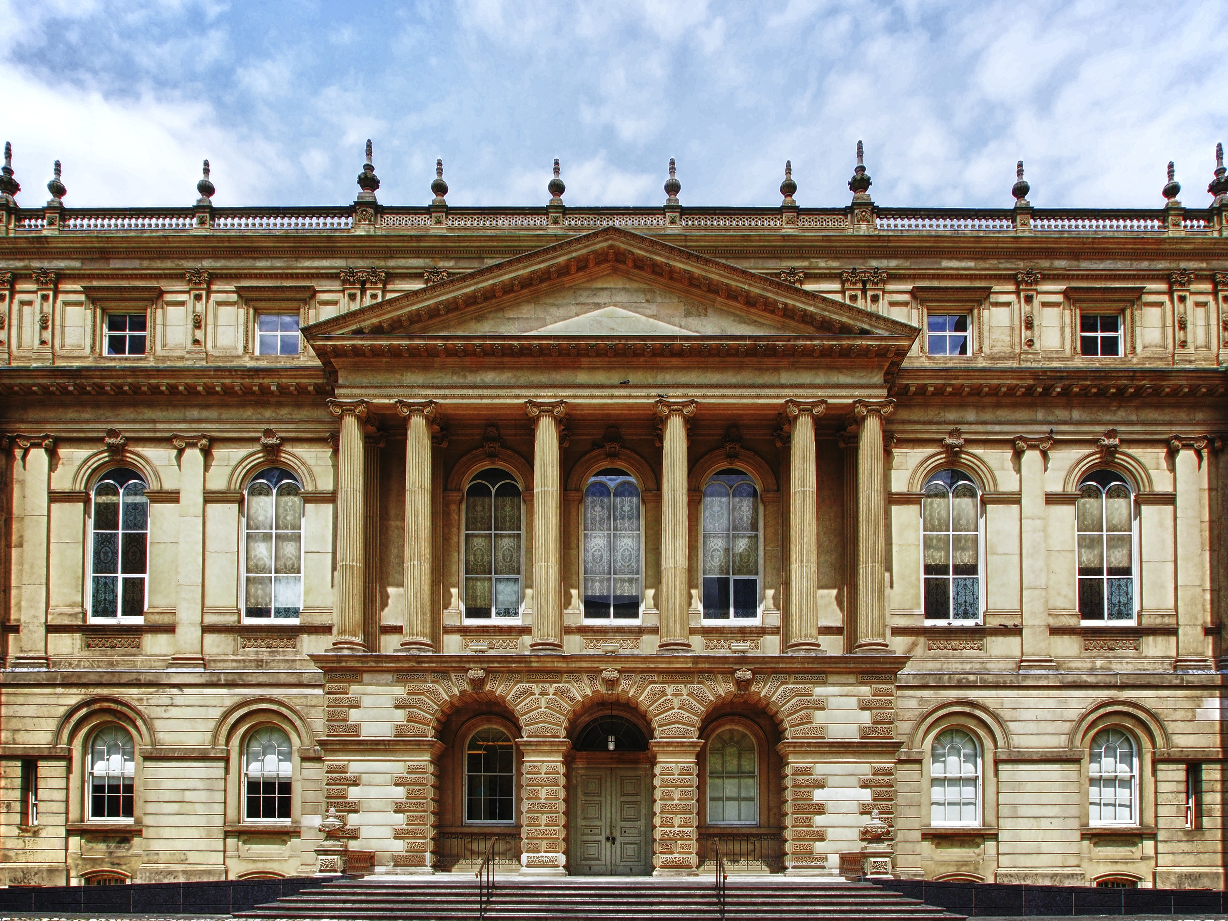 Osgoode Hall Toronto, Canada